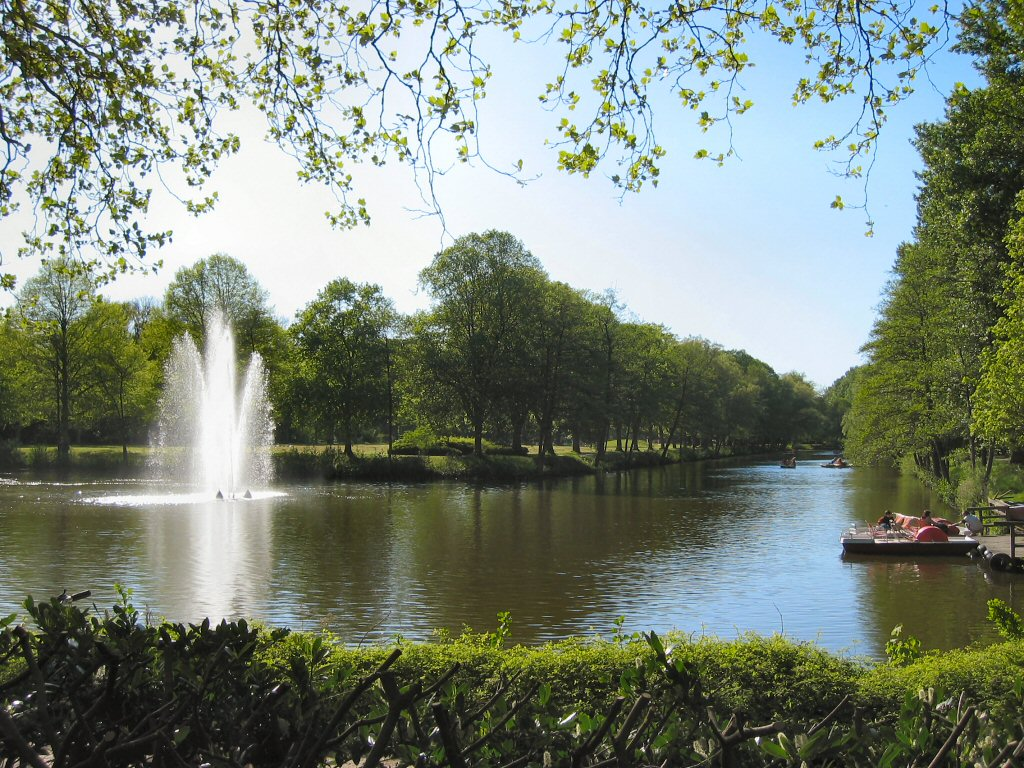 Wilhelmshaven, Rüstringer Stadtpark - Blick vom Bootshaus den Stadtparkkanal hinunter